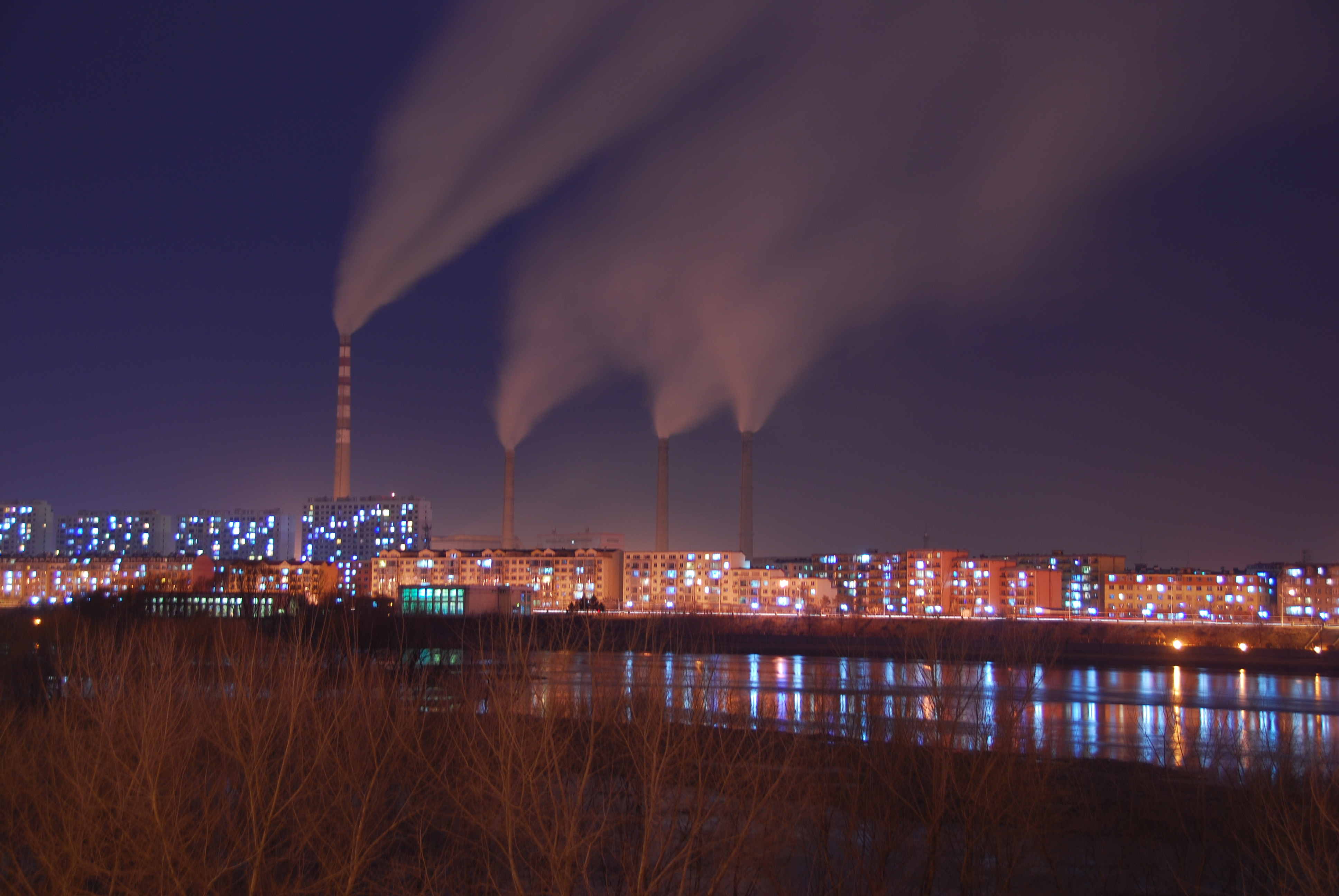 龙潭区夜景